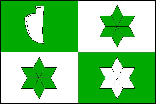 Vlajka obce Svobodné Heřmanice